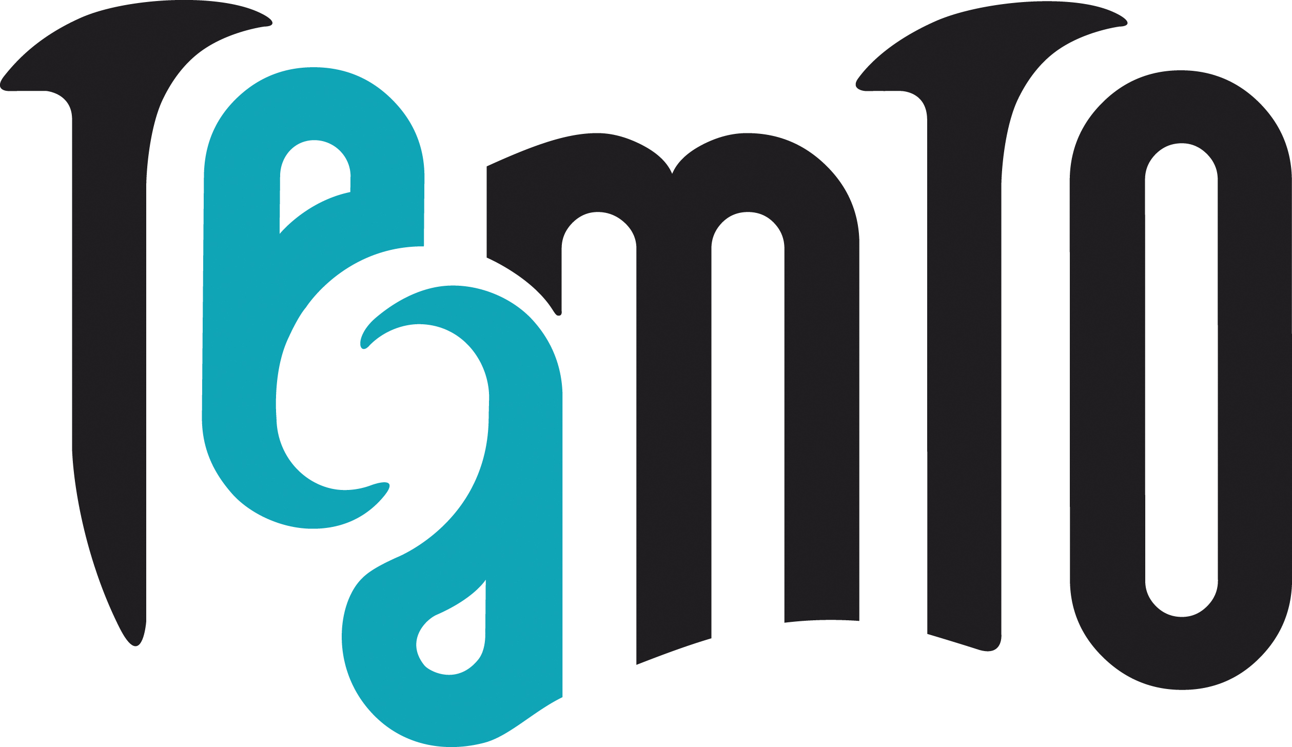 Nouveau logo du studio